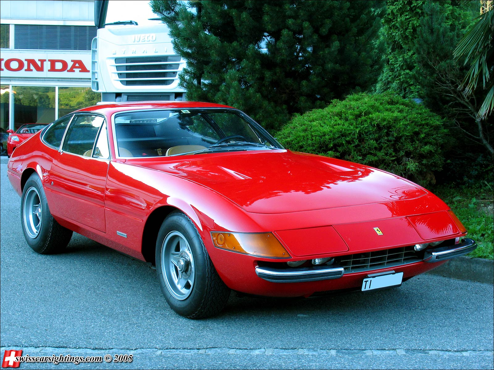 Frontansicht eines Ferrari Daytona Coupe